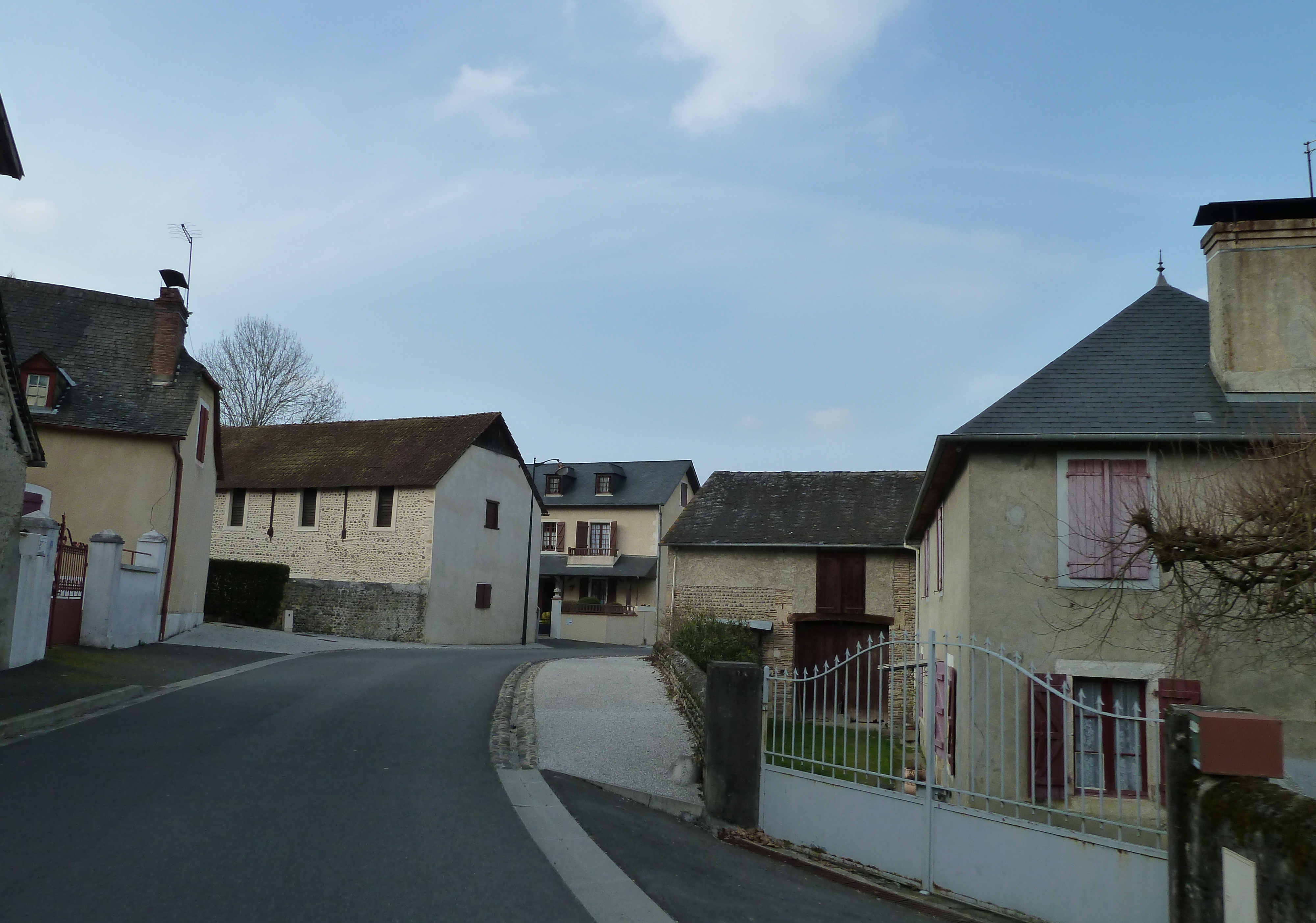 Arbus